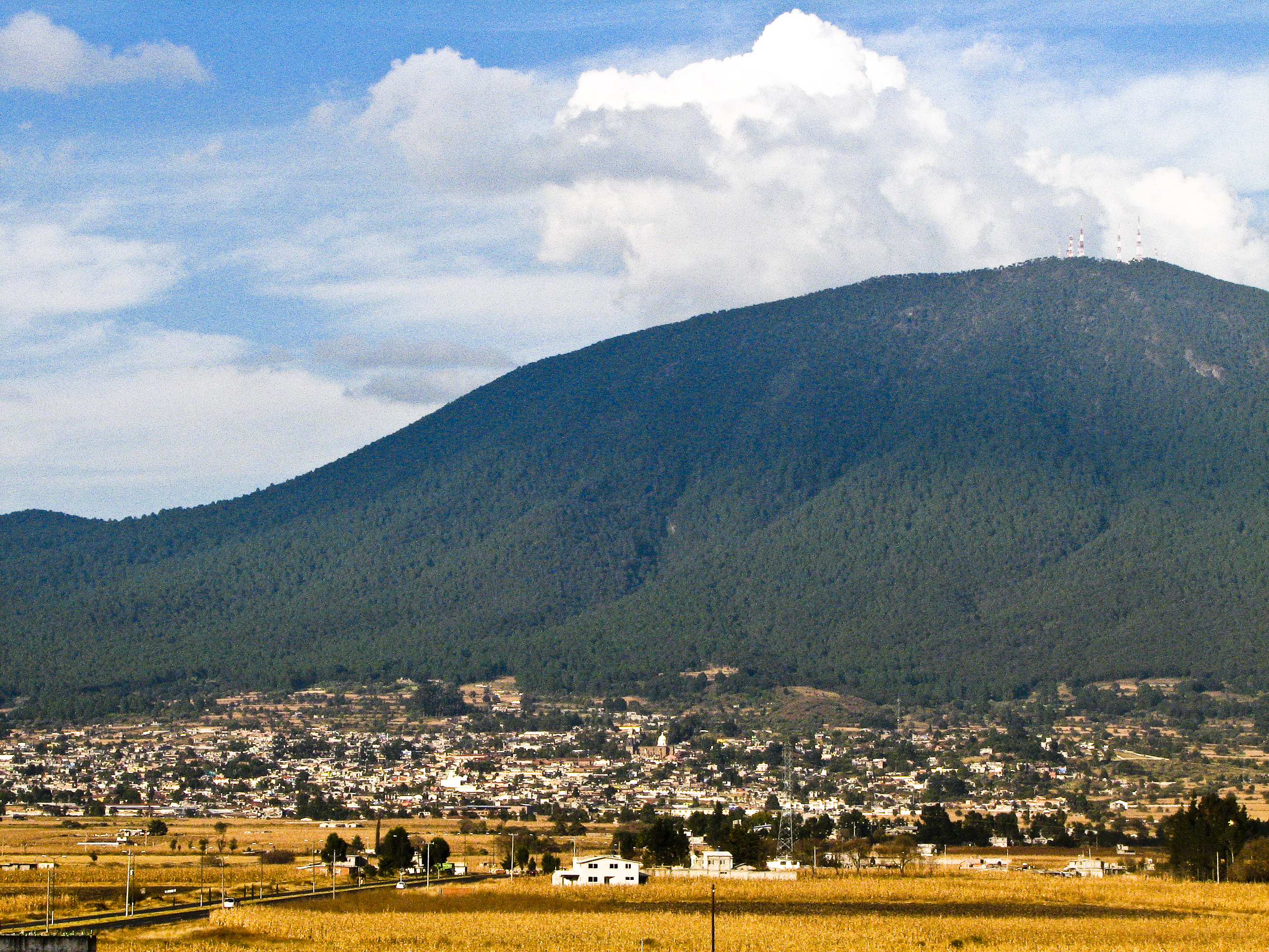 El cerro de Jocotitlán; en la parte baja se observa el poblado homónimo.